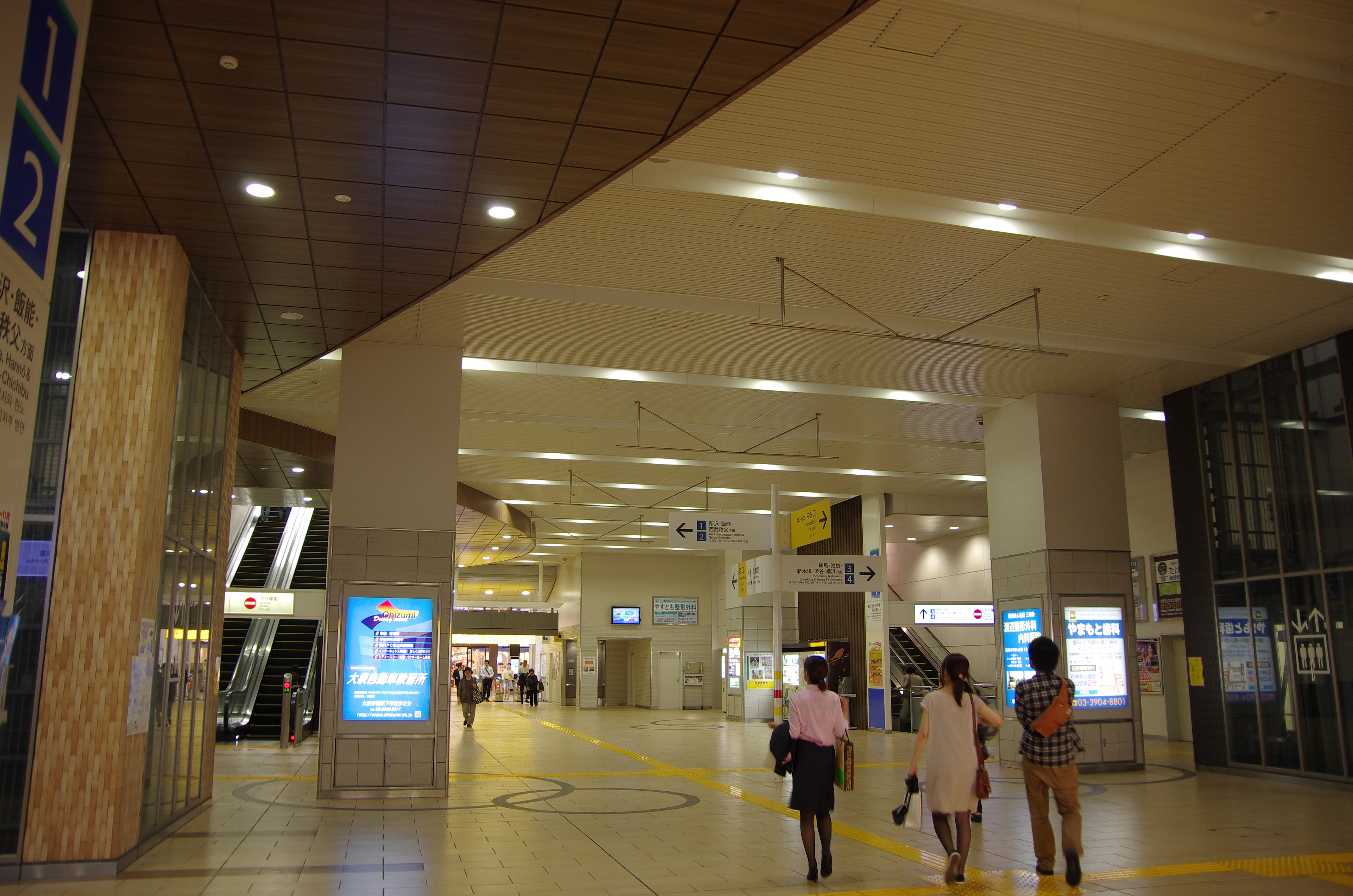 石神井公園駅ラチ内コンコースを中央口から西口に向かって撮影。